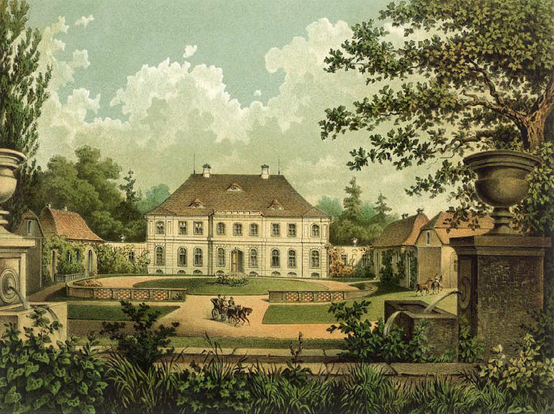 Schloss Königshain, Kreis Görlitz, Provinz Schlesien